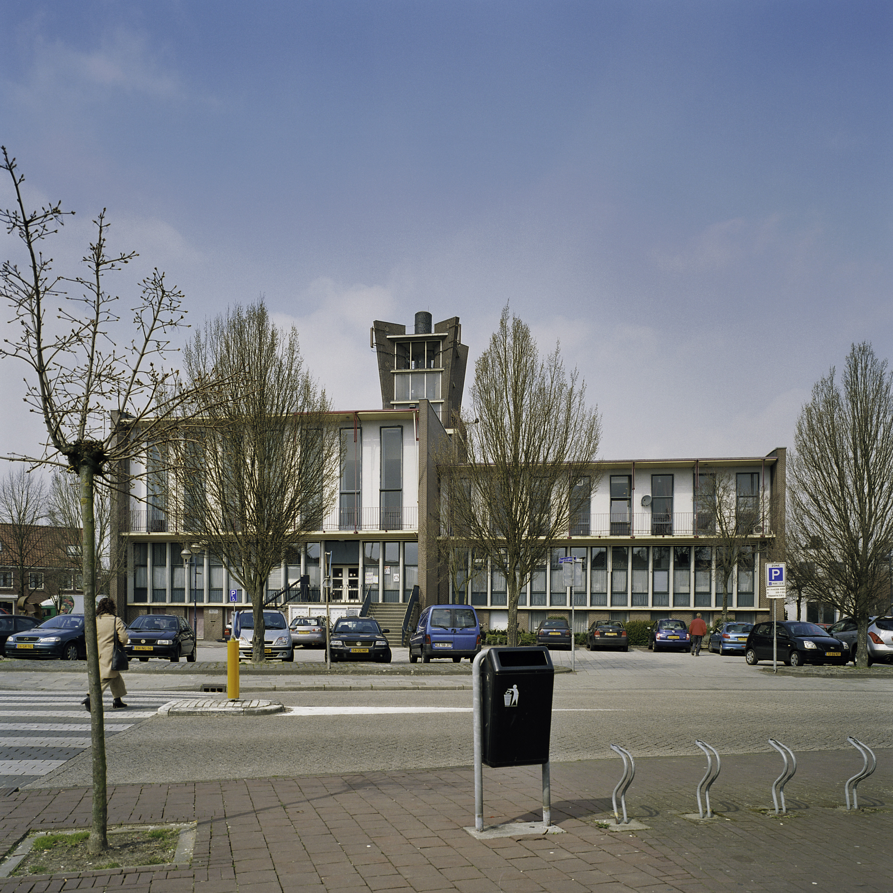 Raadhuis: Overzicht van de voorgevel